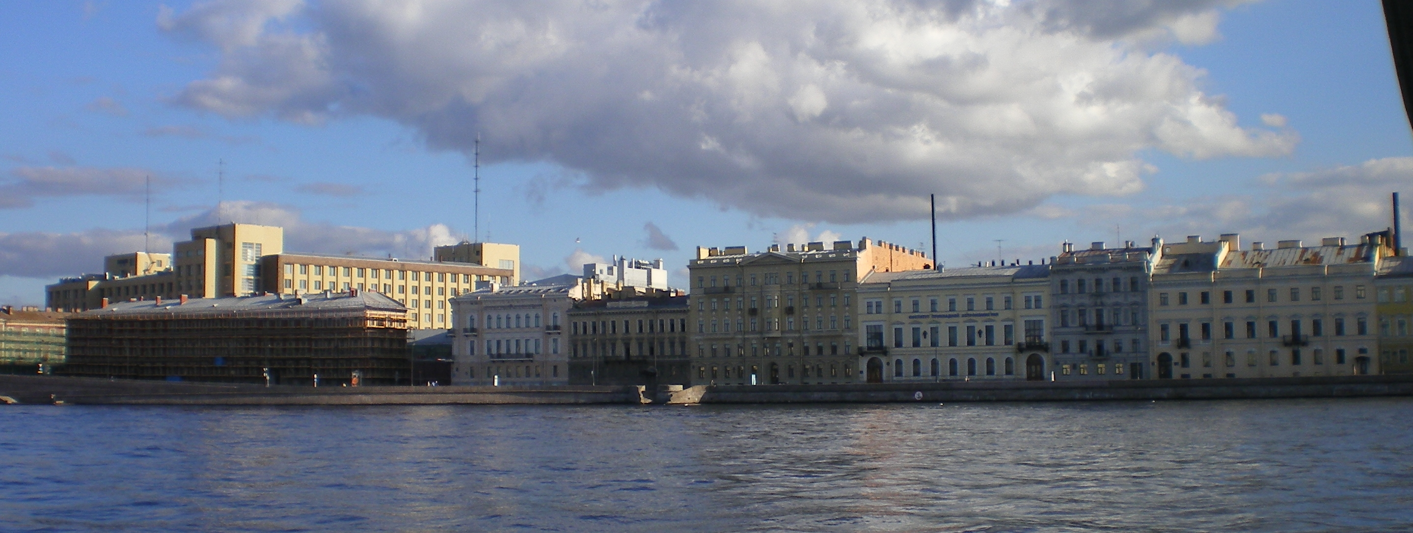 Набережная Кутузова дома 2-14, вид с Невы. Кричевский переулок, спуск к Неве у дома № 8